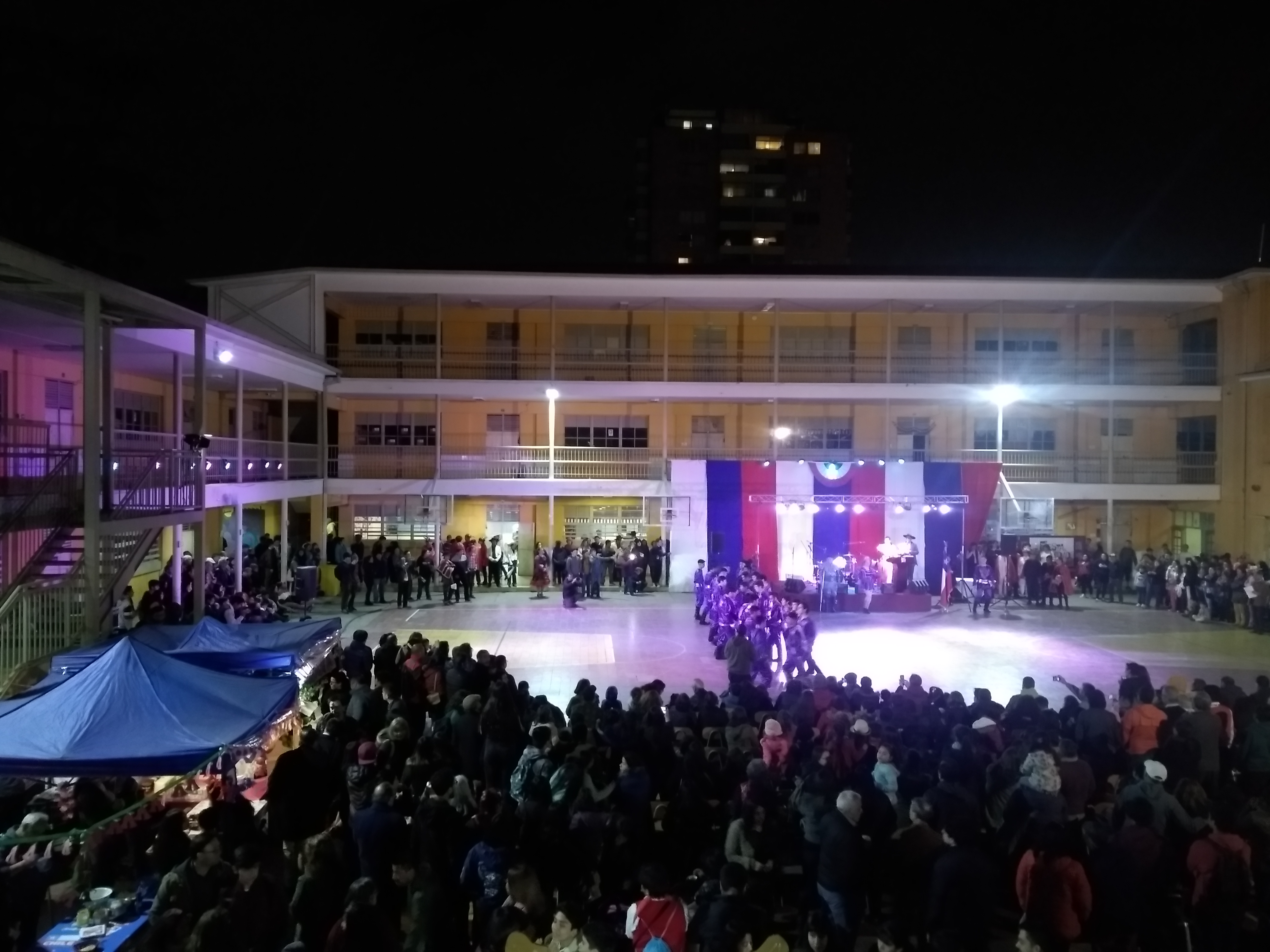 La fiesta de la chilenidad en el Liceo Andres Bello es un que se realiza tipicamente durante las noches donde se realizan bailes y ademas hay fondas donde venden comidas típicas y bebidas.